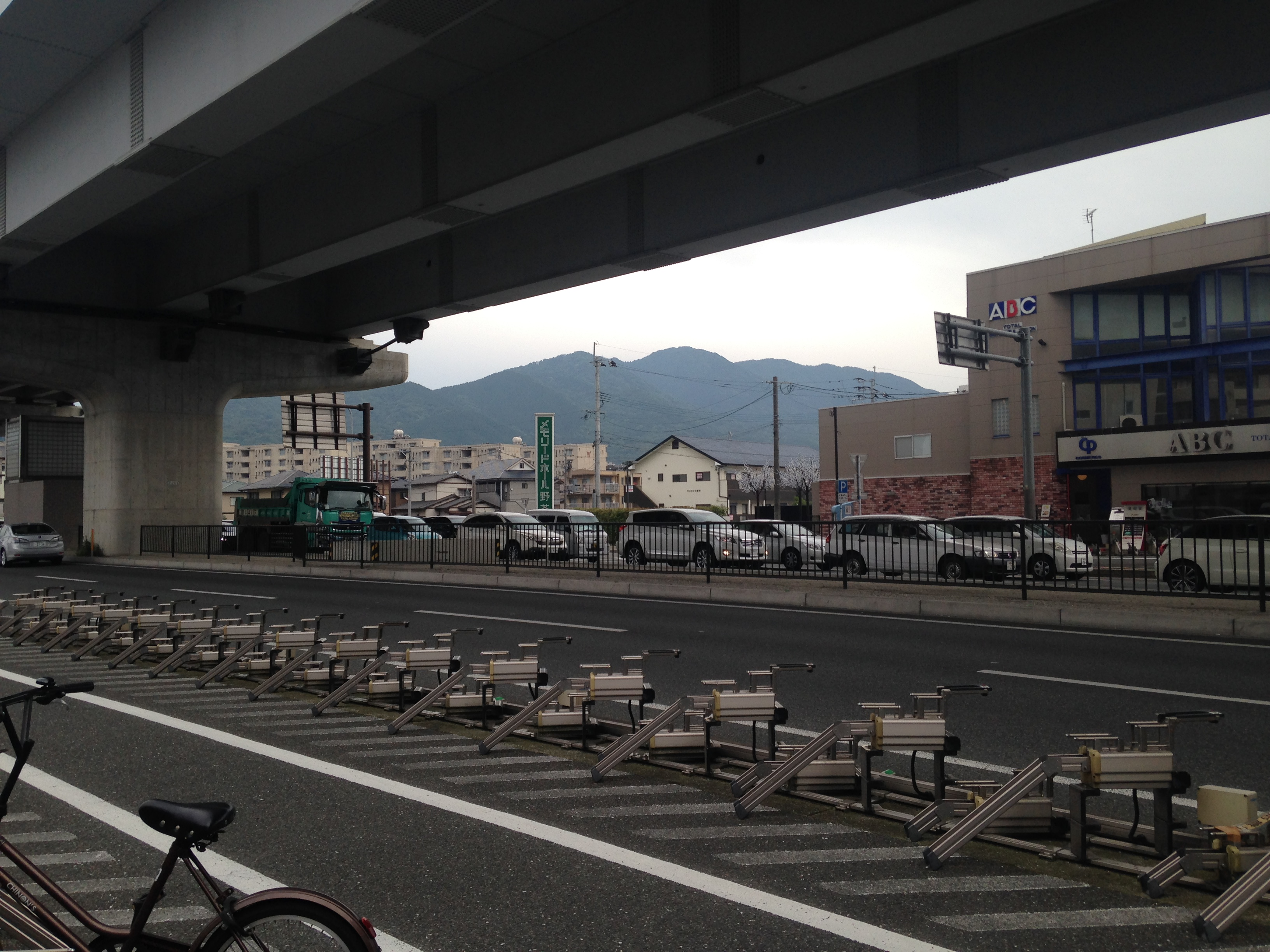 野芥駅付近より望む油山